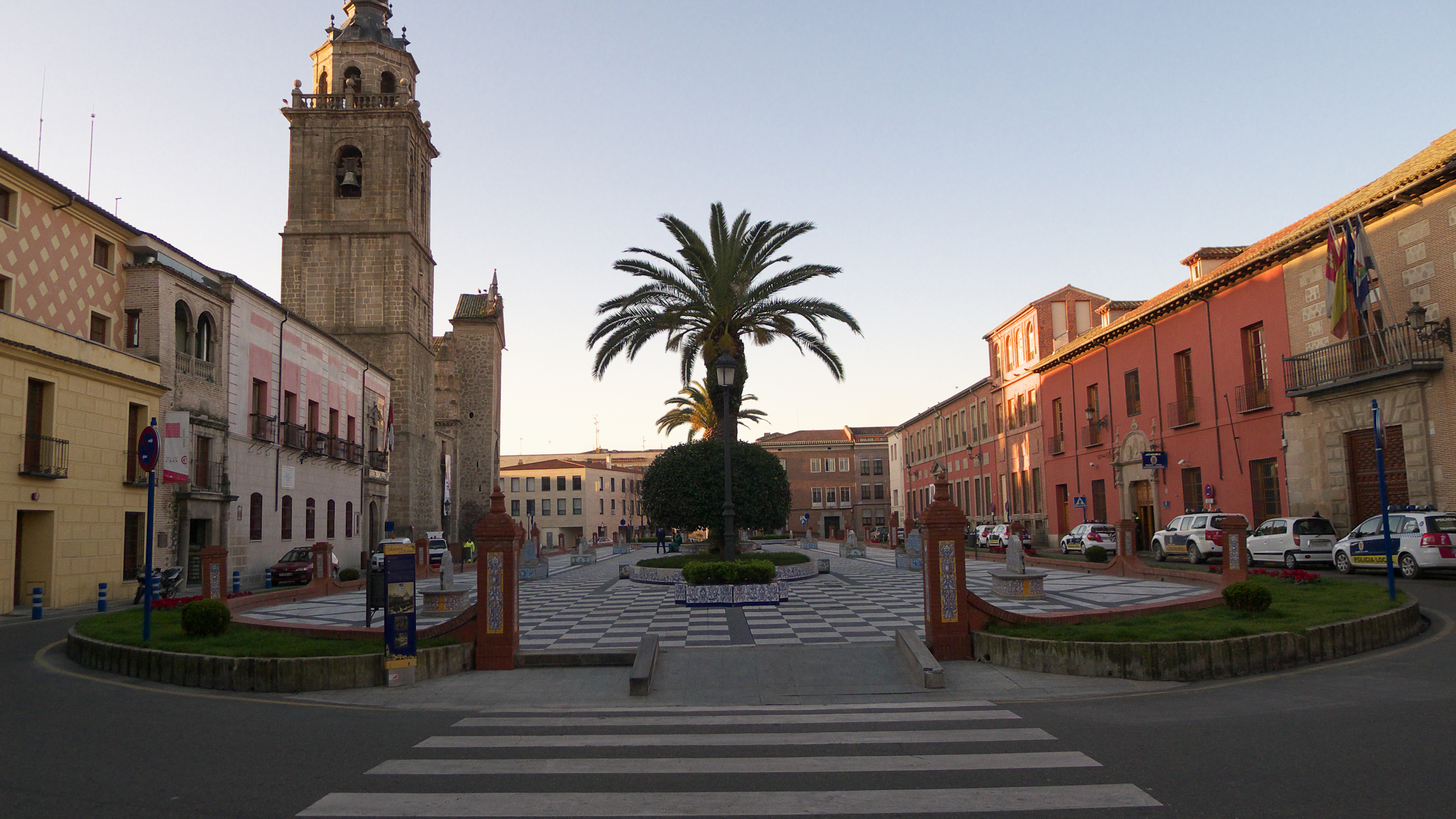 Plaza principal de la ciudad